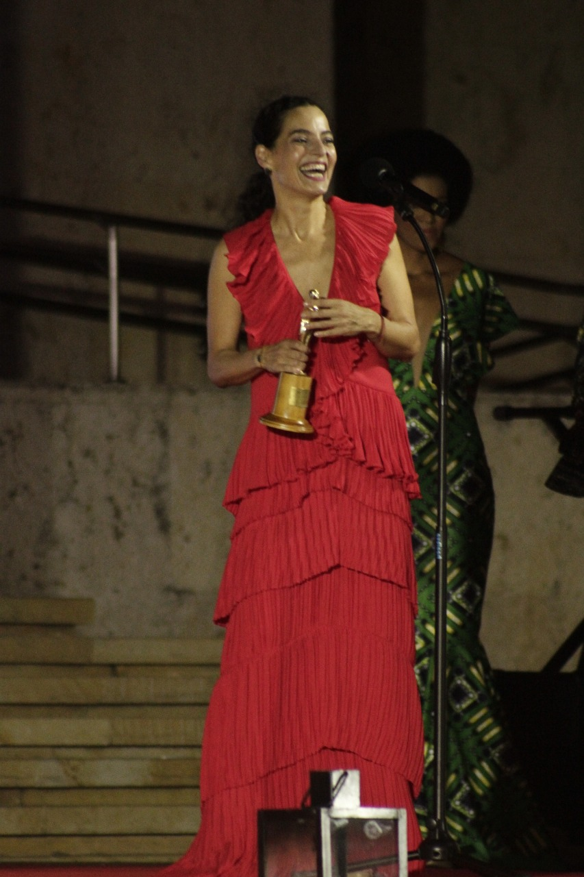 Recibiendo la India Catlina en le marco del festival de Cine de Cartagena